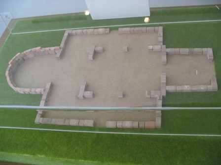 Grundriss.